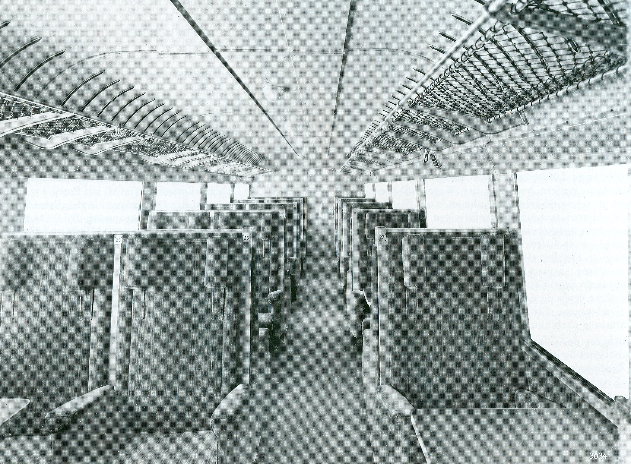 Inneneinrichtung des SVT Kruckenberg auf einer Werksaufnahme von Westwaggon